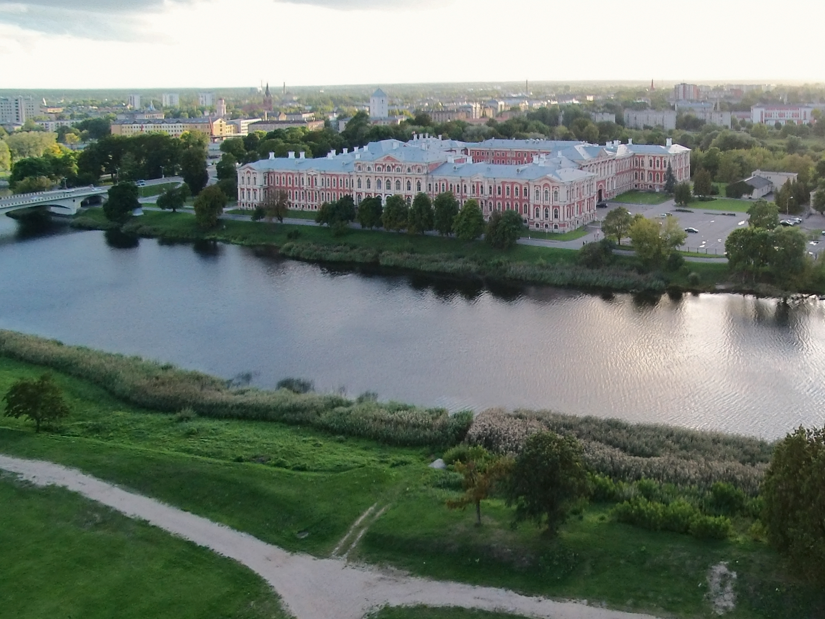 Jelgavas pils ar parku, Jelgava, Lielā iela 2